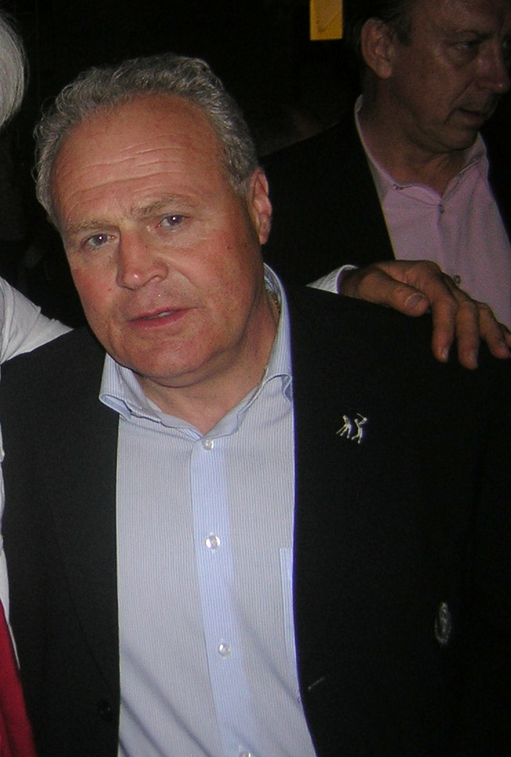 Dominique D'Onofrio lors de la parade du Standard 2008-05-6